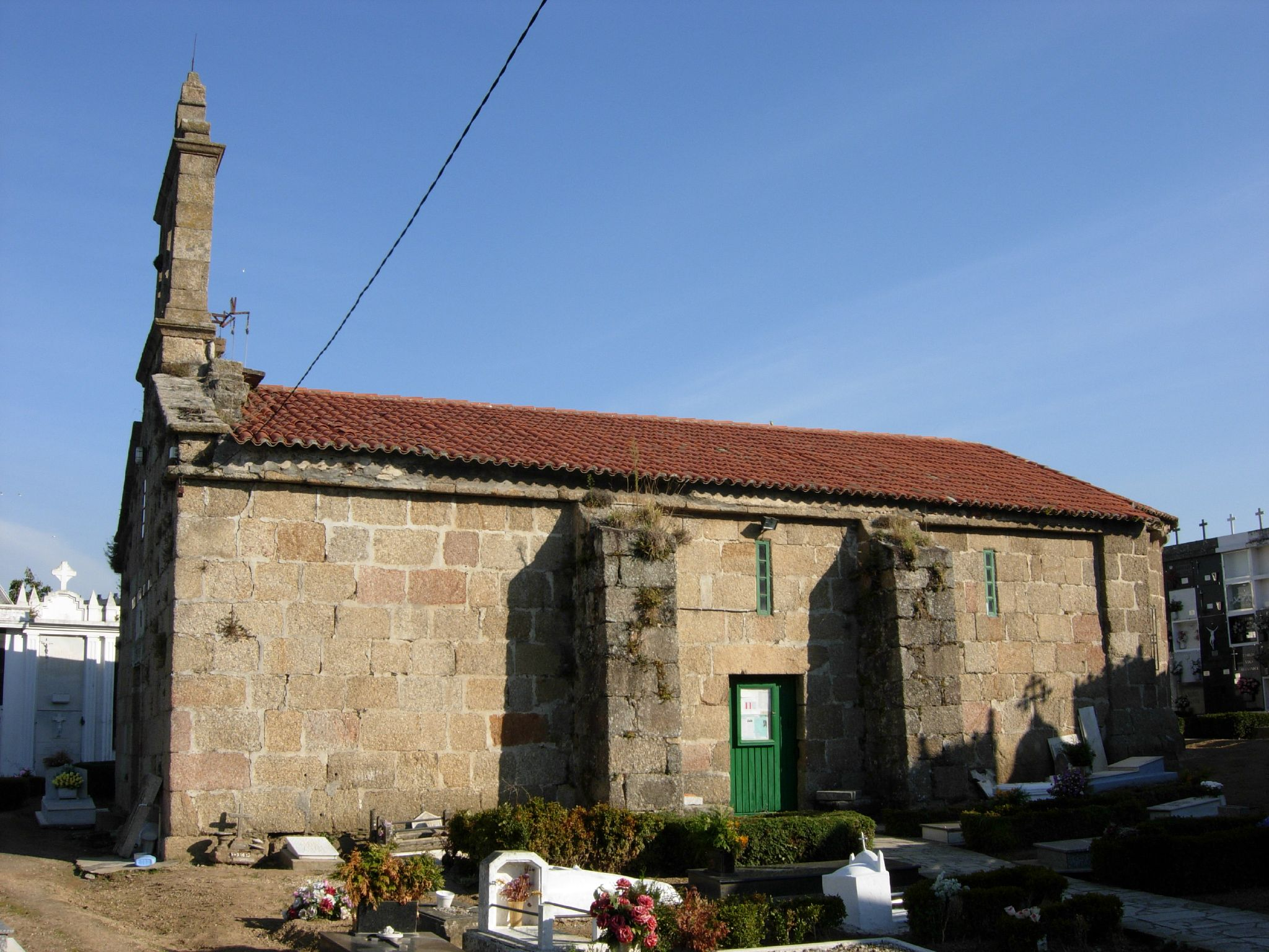 Iglesia románica construida en el siglo XII, de una sola nave con ábside semicircular, decorado con canecillos.